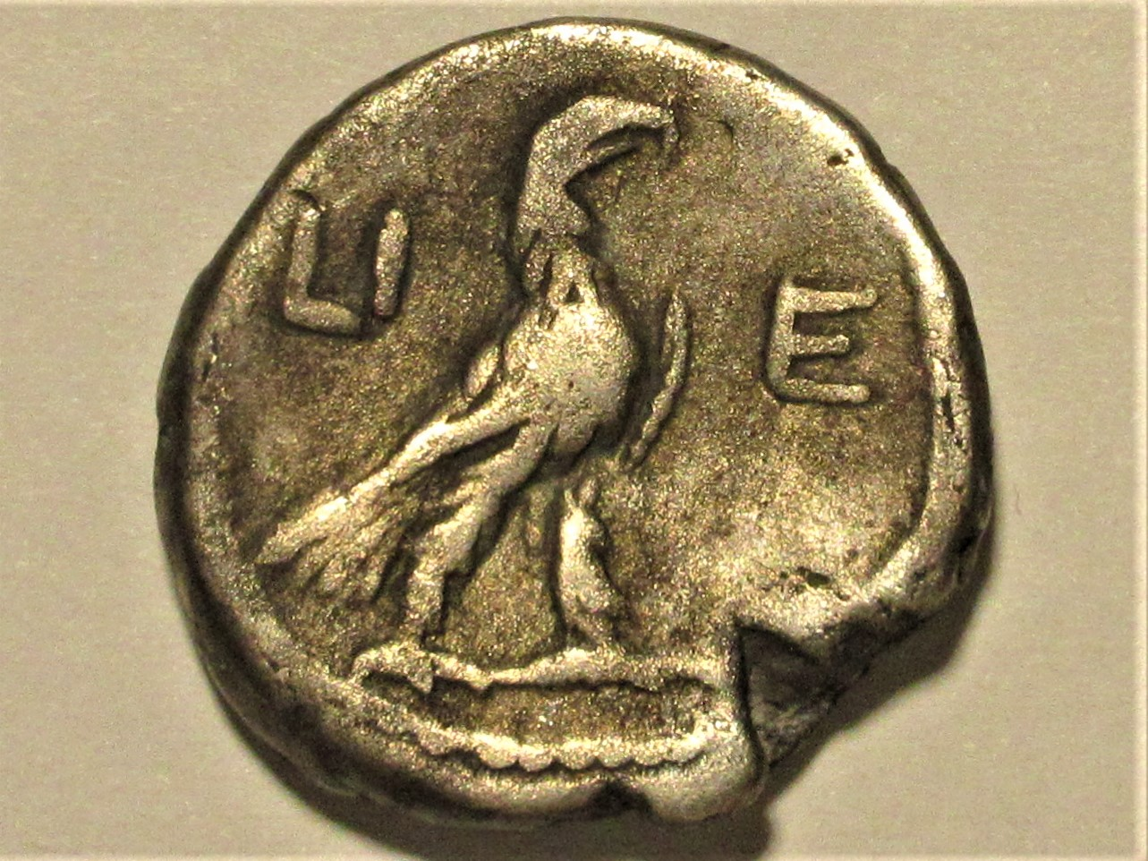 Alexandrinische Tetradrachme des Trajan, Jahr 15, mit Adler nach ptolemaischem Vorbild, Kampmann/Gaschow 27.368